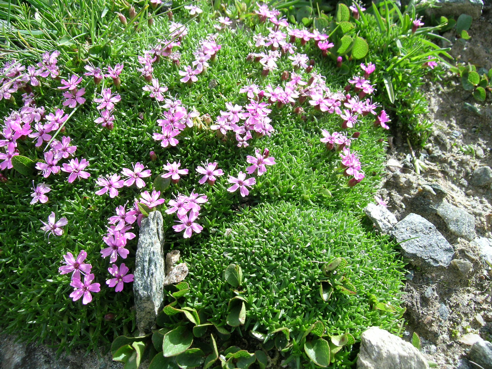 Silene acaulis Zermatt, Riffelberg (Kanton Wallis, Switzerland), 2500 m Author: Roland Teuscher – own photograph Date: 1.08.06